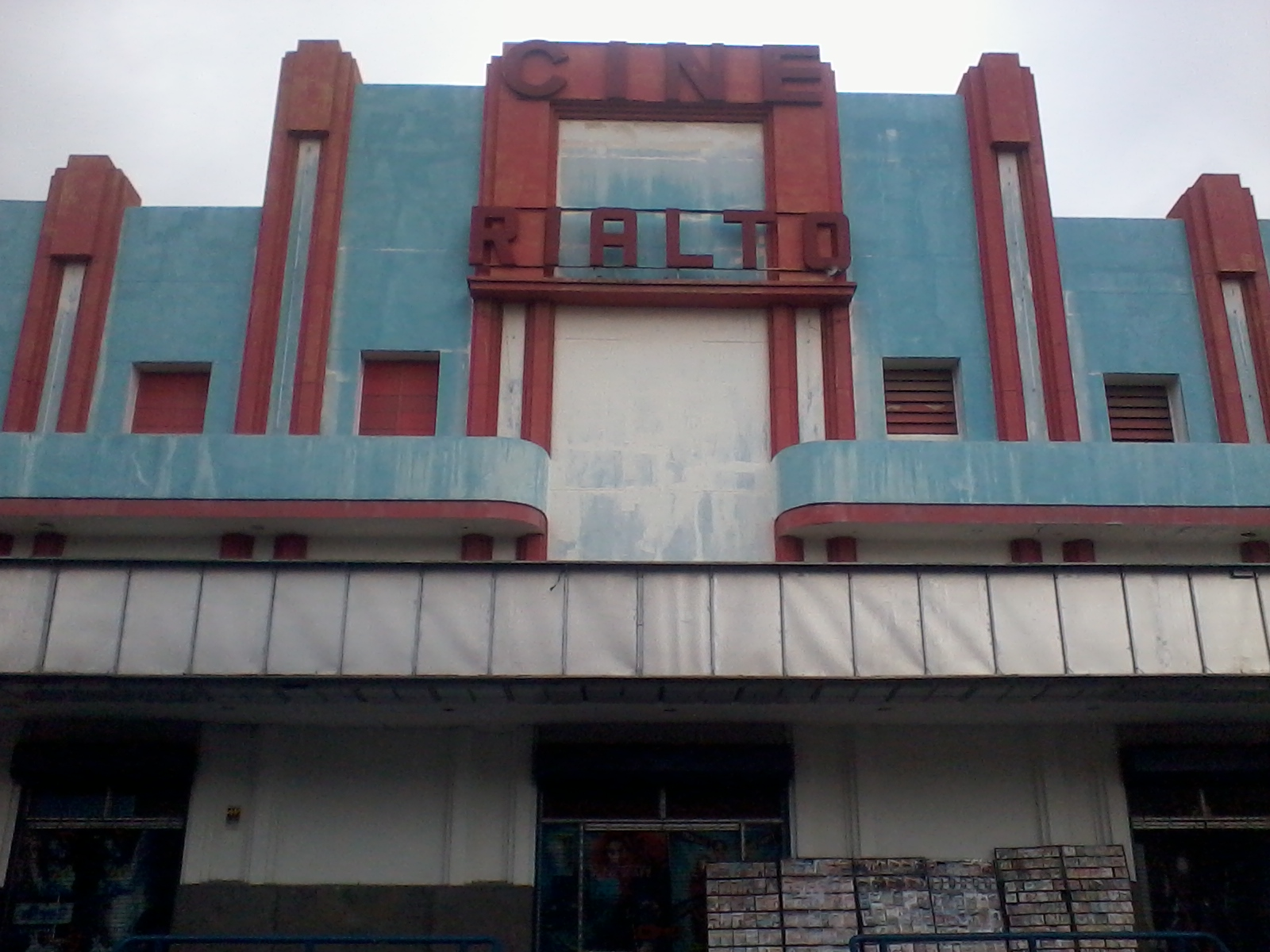 Entrada del cine rialto